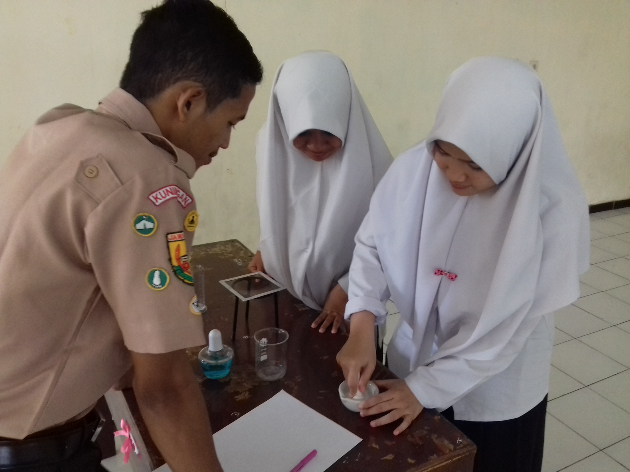 Kegiatan Praktik Laboratorium